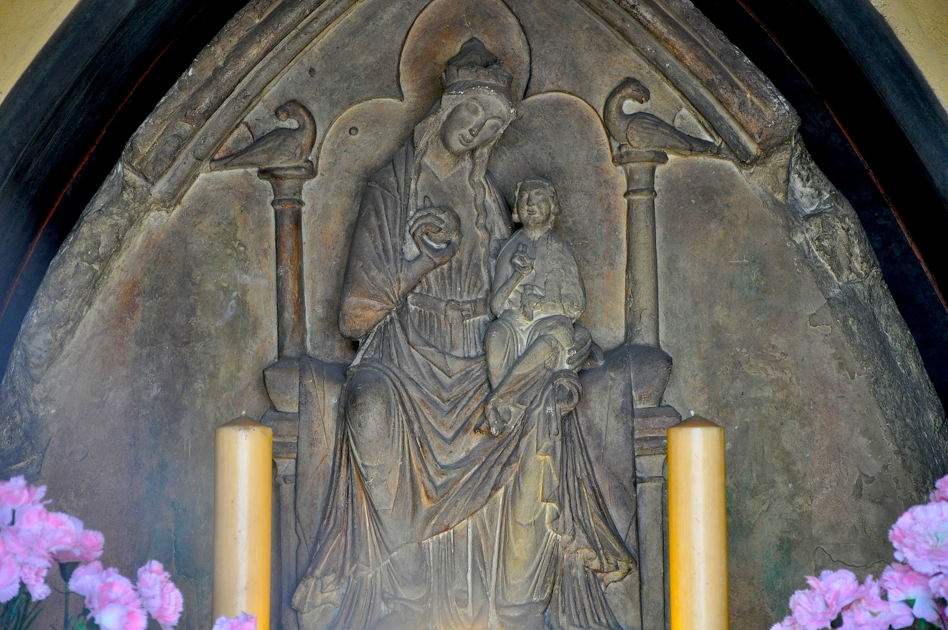 Kapelica v Krakovem, Ljubljana (EŠD 2004). Relief Marije z detetom na prestolu, 13. stoletje (luneta portala stare križevniške cerkve).